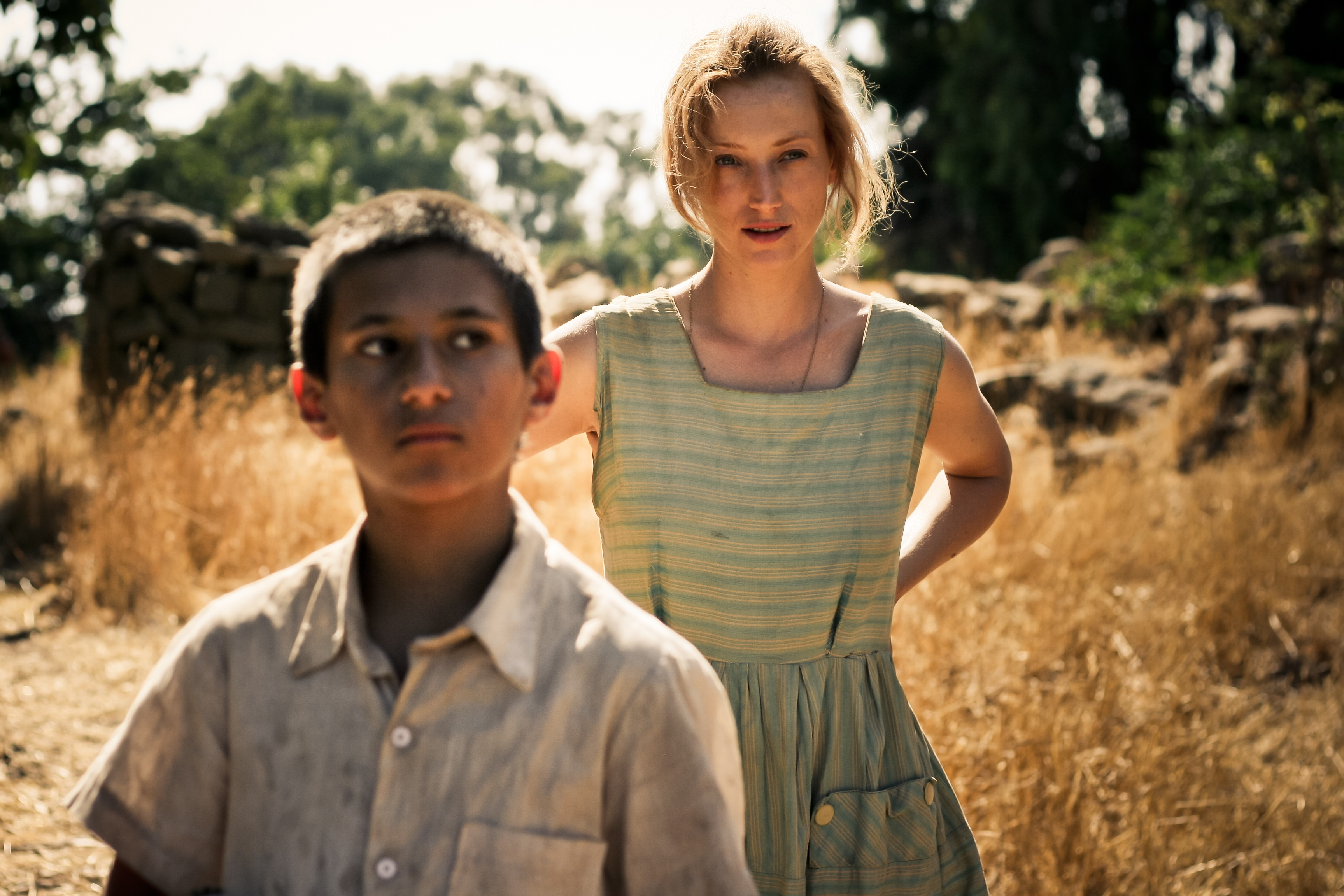 הילה וידור ומתן אברבך בסרט לוויה בצהריים צילום ערן כהן 2012